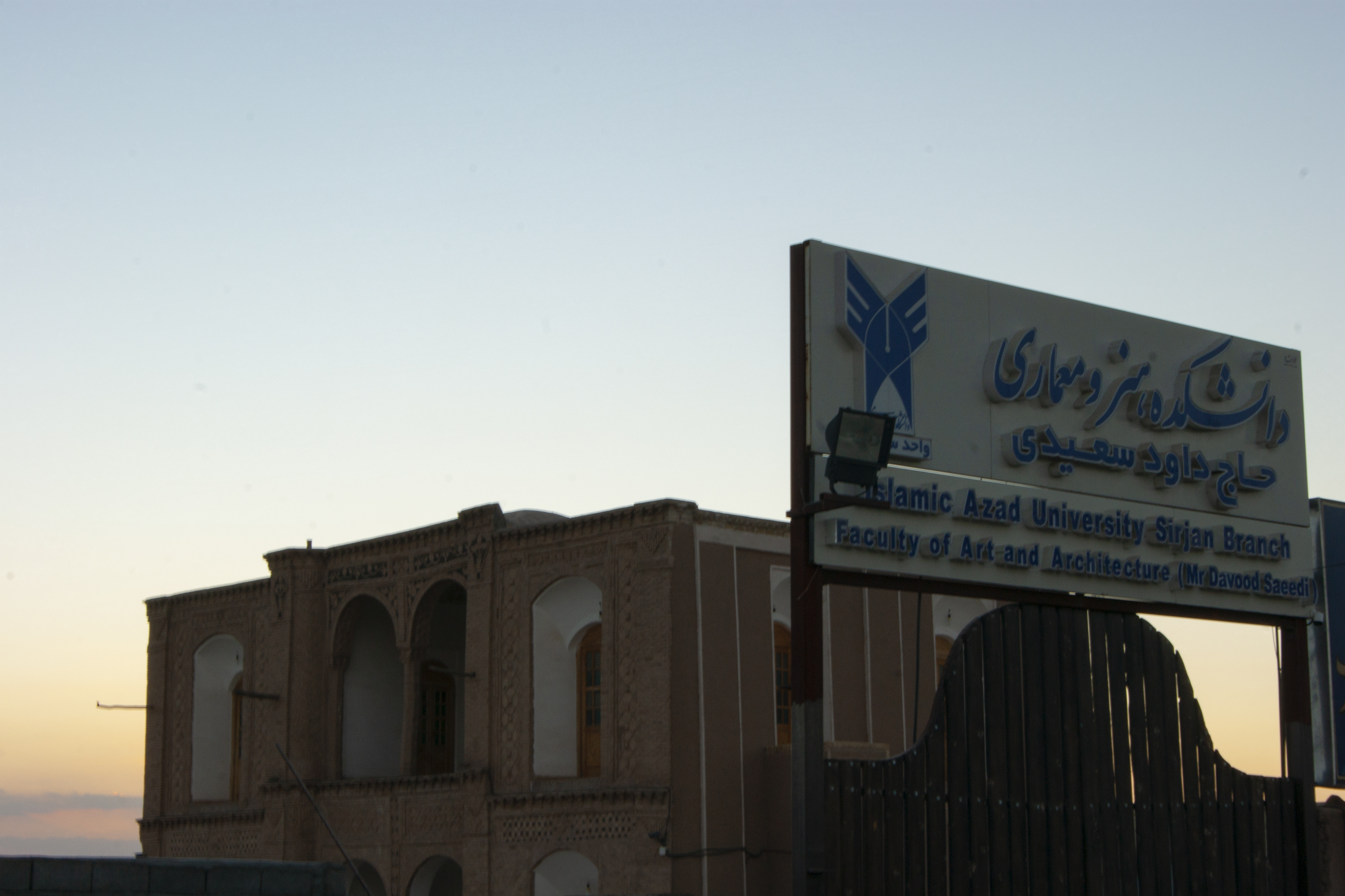 خانه علی‌اصغر شوکت سعیدی